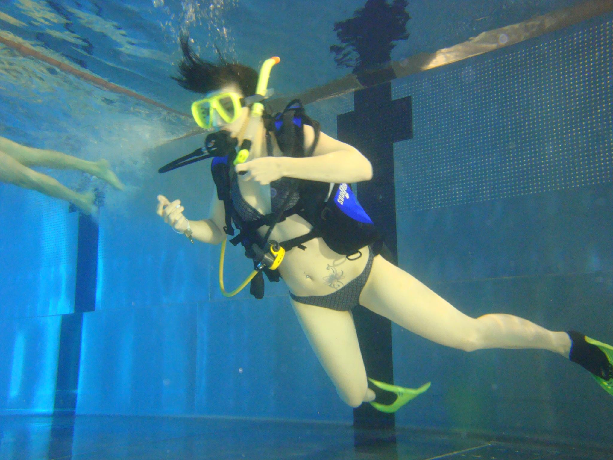 Frau beim Tauchen.